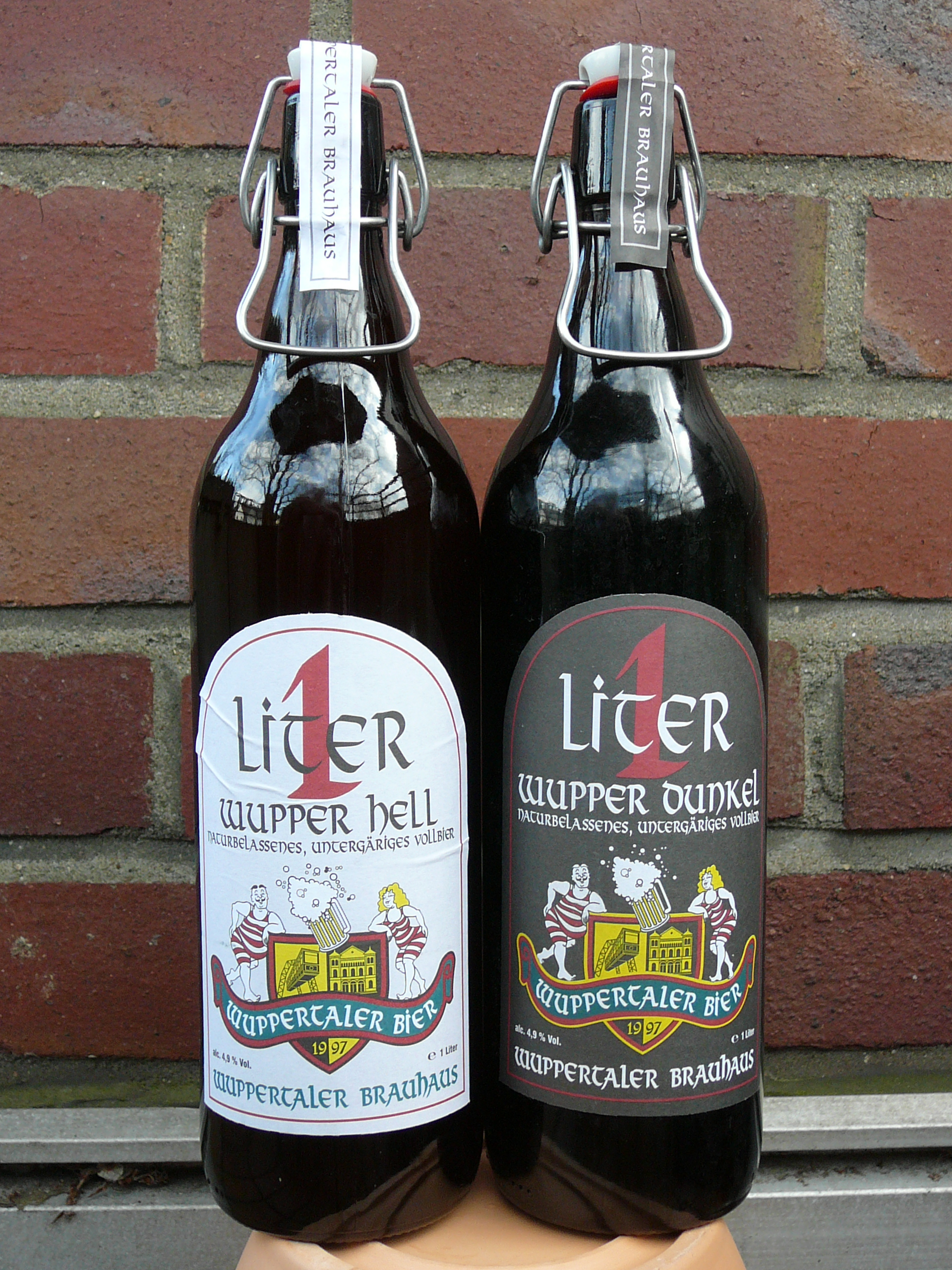 Wuppertaler Bauhaus: Biermarken Wupper Hell und Wupper Dunkel